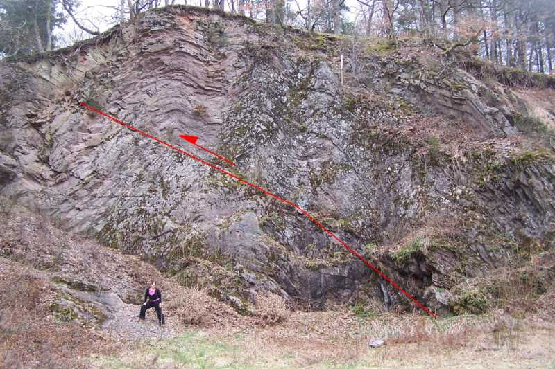 Eigen werk; GFDL